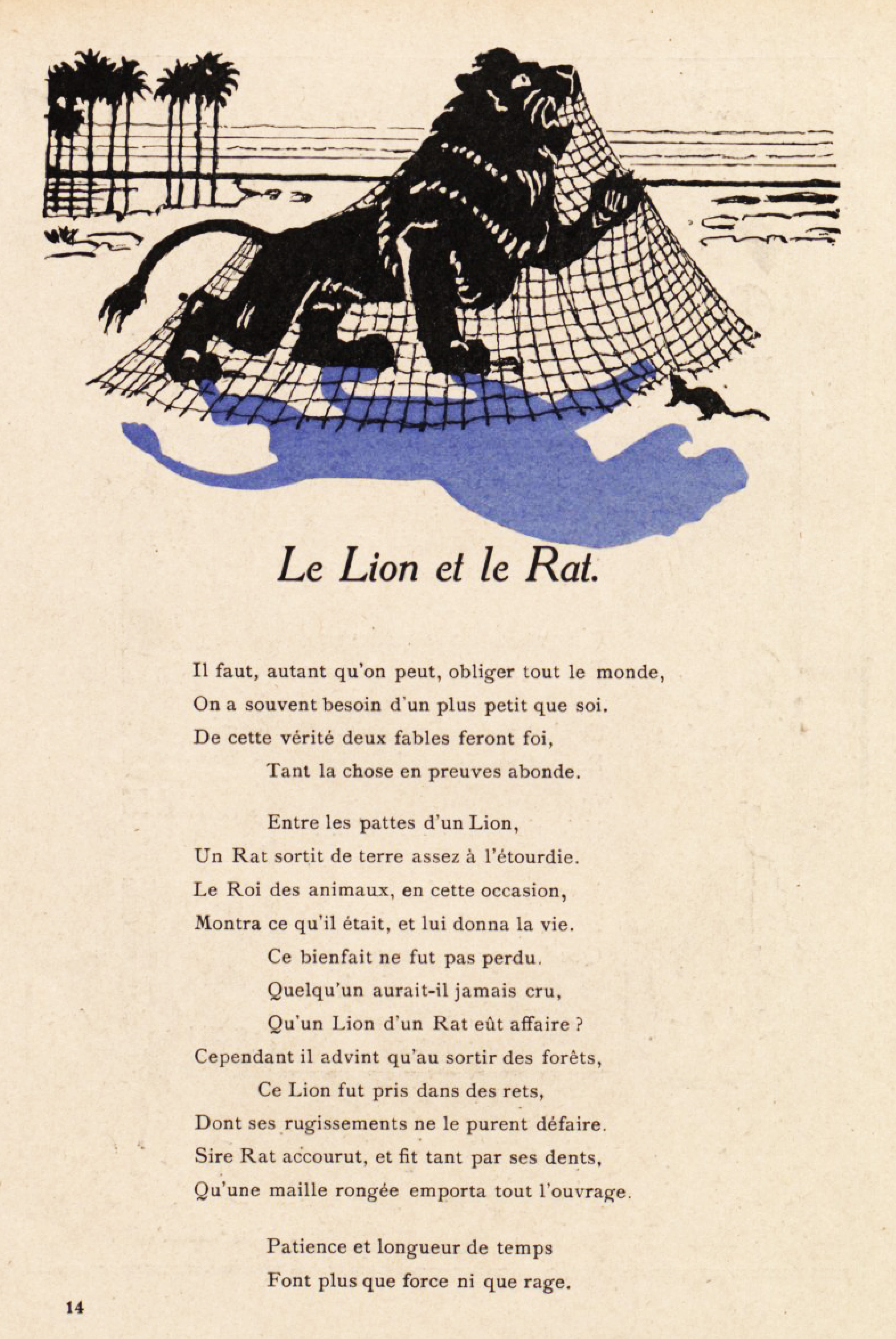 Dessin réalisé par Henri Avelot représentant la fable Le Lion et le Rat de Jean de La Fontaine et extrait du livre " Dix fables d'animaux, illustrations en silhouettes humoristiques aux dépens des humains " (Paris, édition Henri Laurens, 1932).